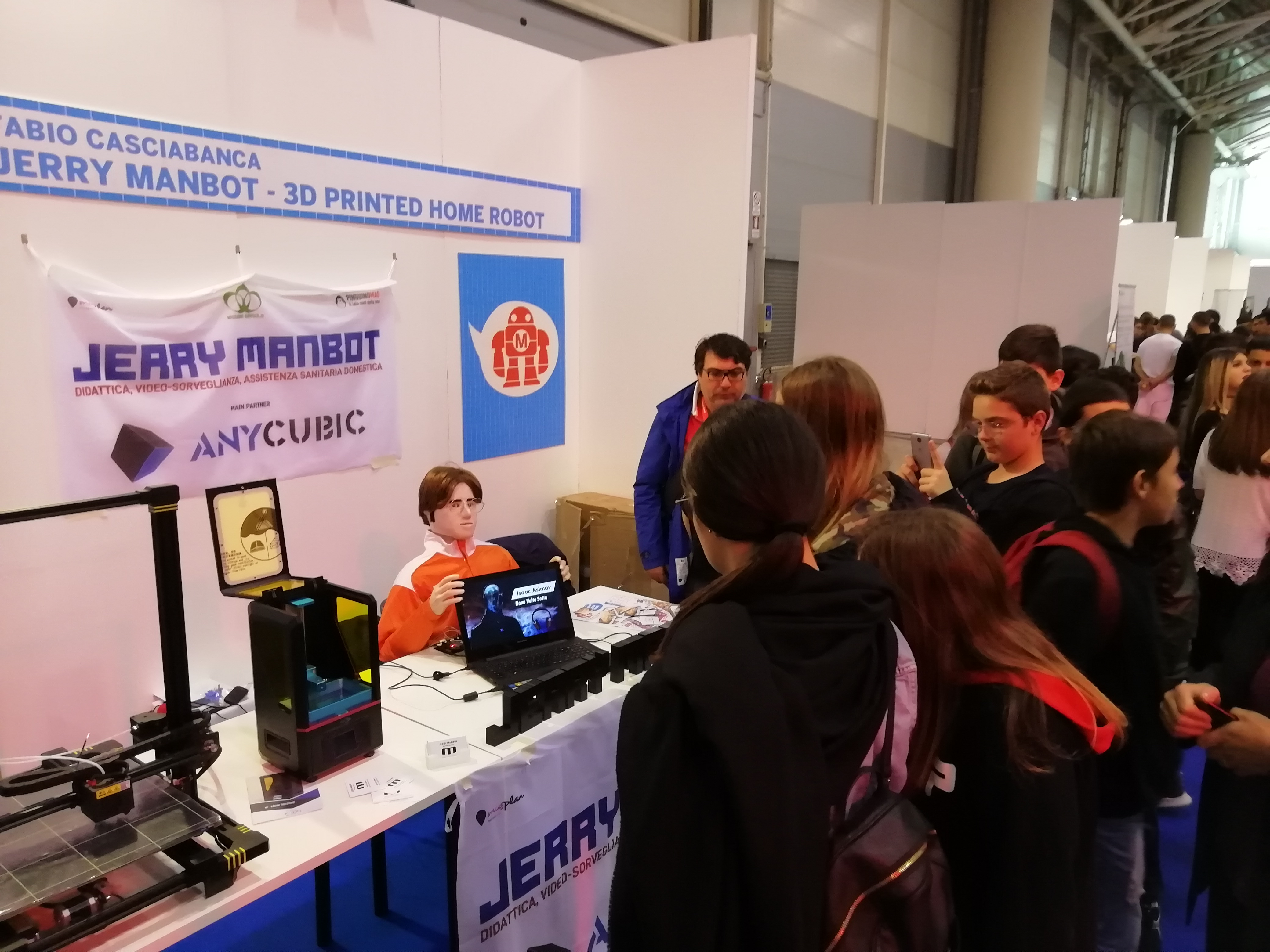 Uno dei primi androidi Manbot alla Maker Faire Rome 2019